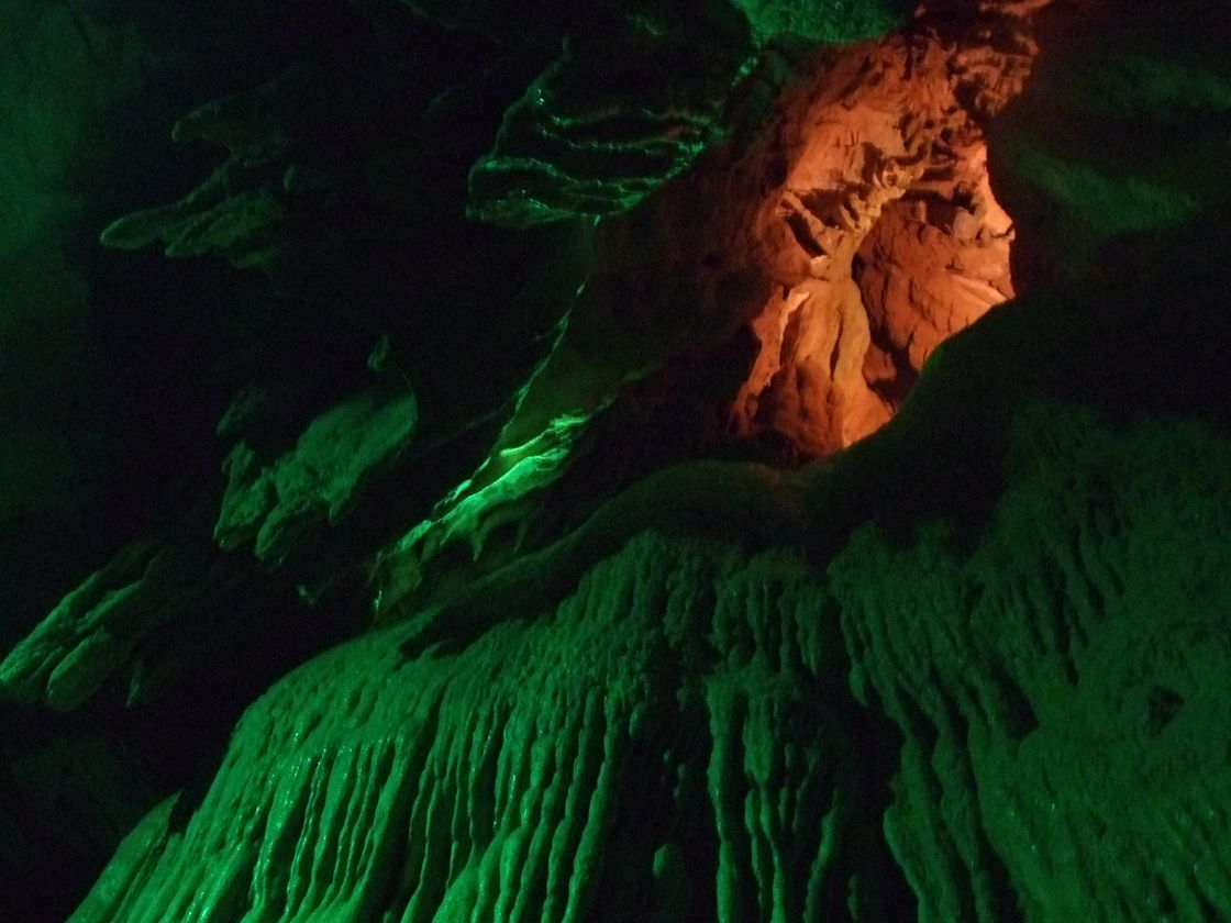 Kyusendo 球泉洞